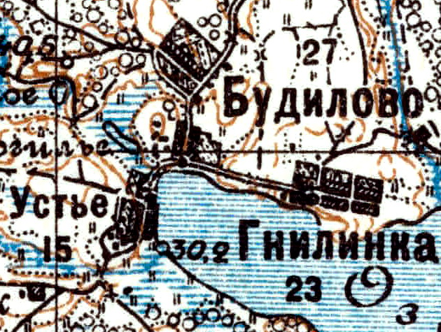 Топографическая карта Ленинградской области, квадрат VIc-26 (Ставотино), деревни Будилово и Гниленка